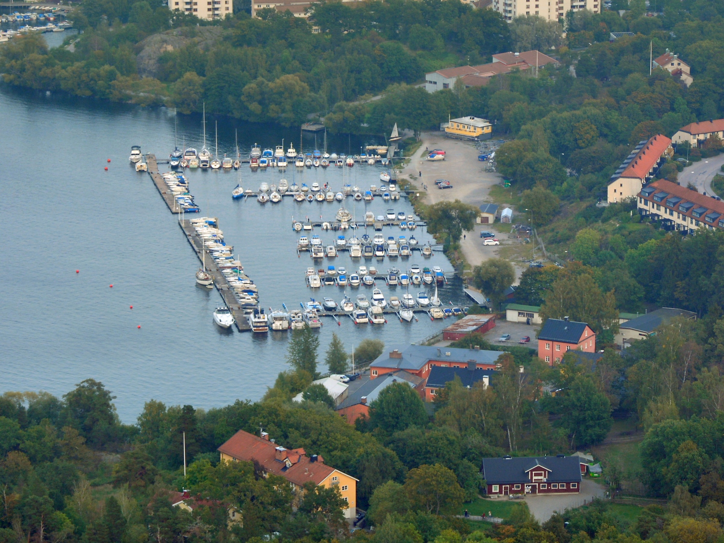 Hägerstenshamnen i Hägersten, södra Stockholm.